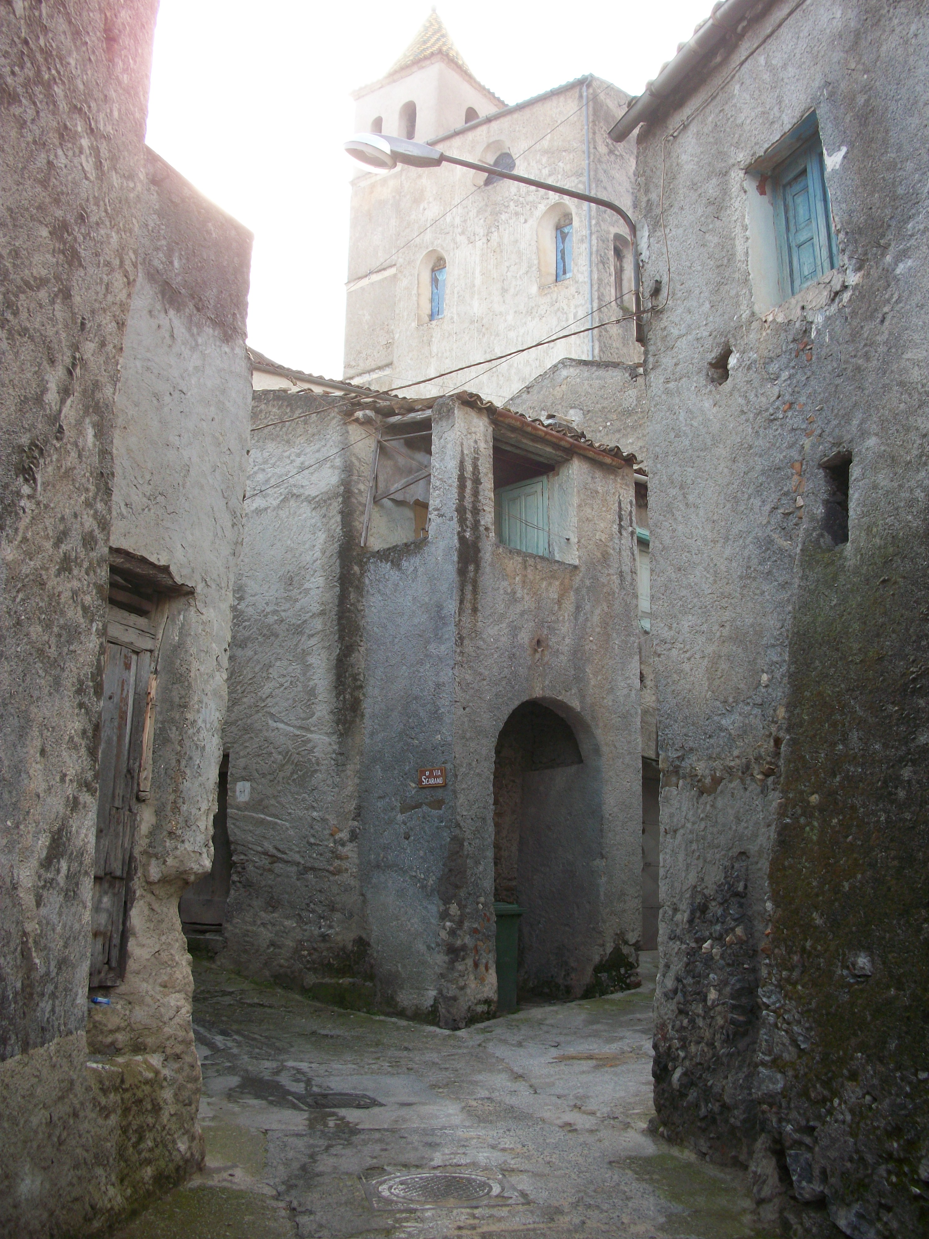 Porta dello Scarano oggi